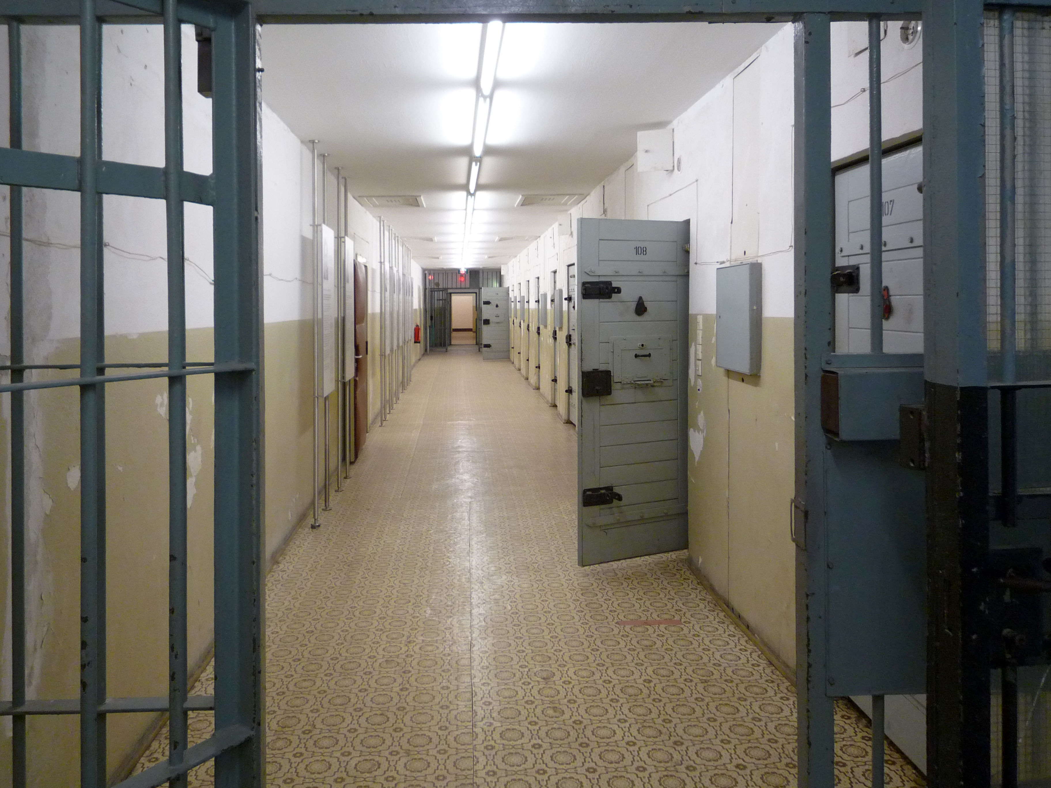 Gang mit Zellen im alten Trakt der Haftanstalt.